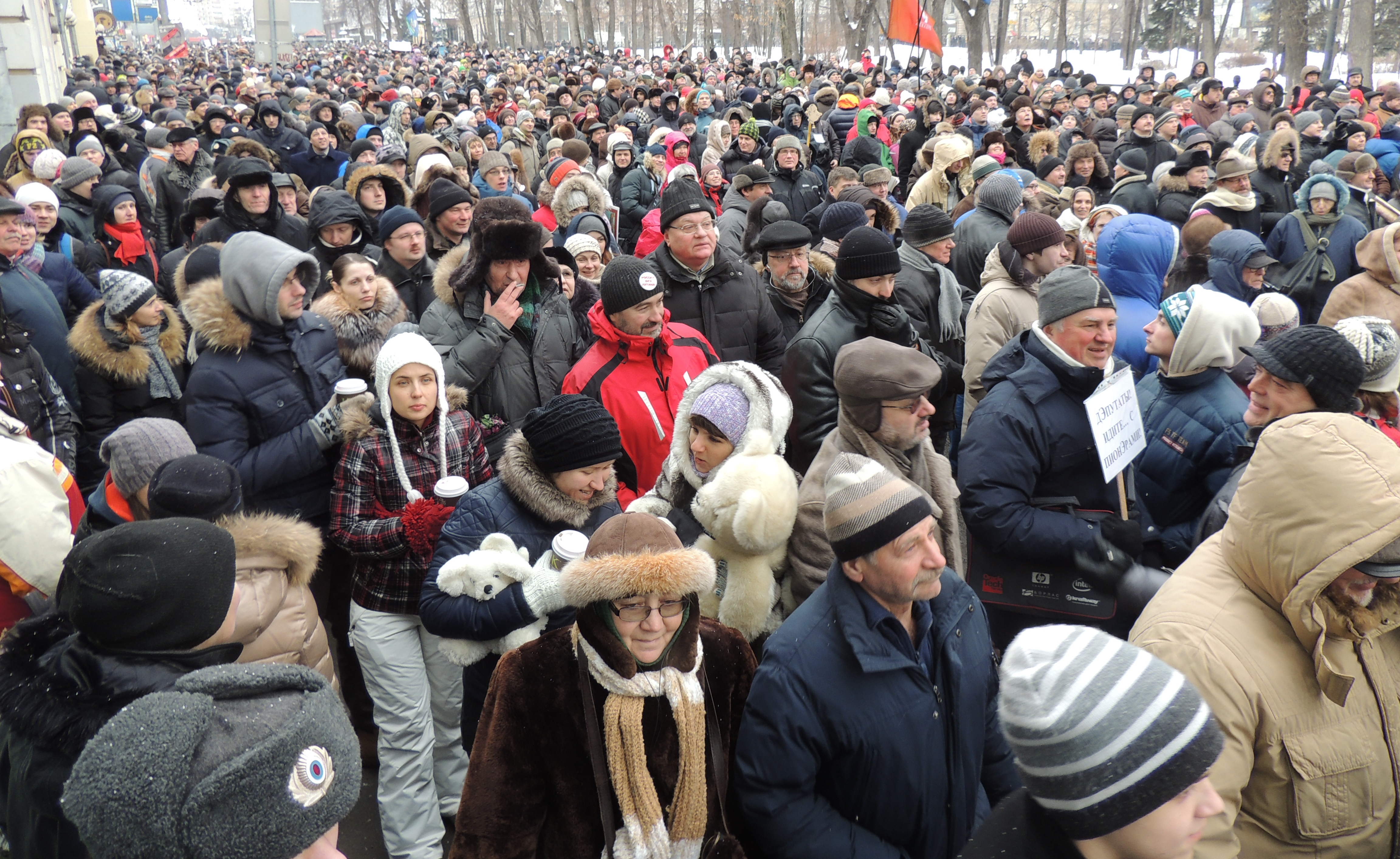 Марш оппозиции 13 января 2013 года в Москве, Страстной бульвар